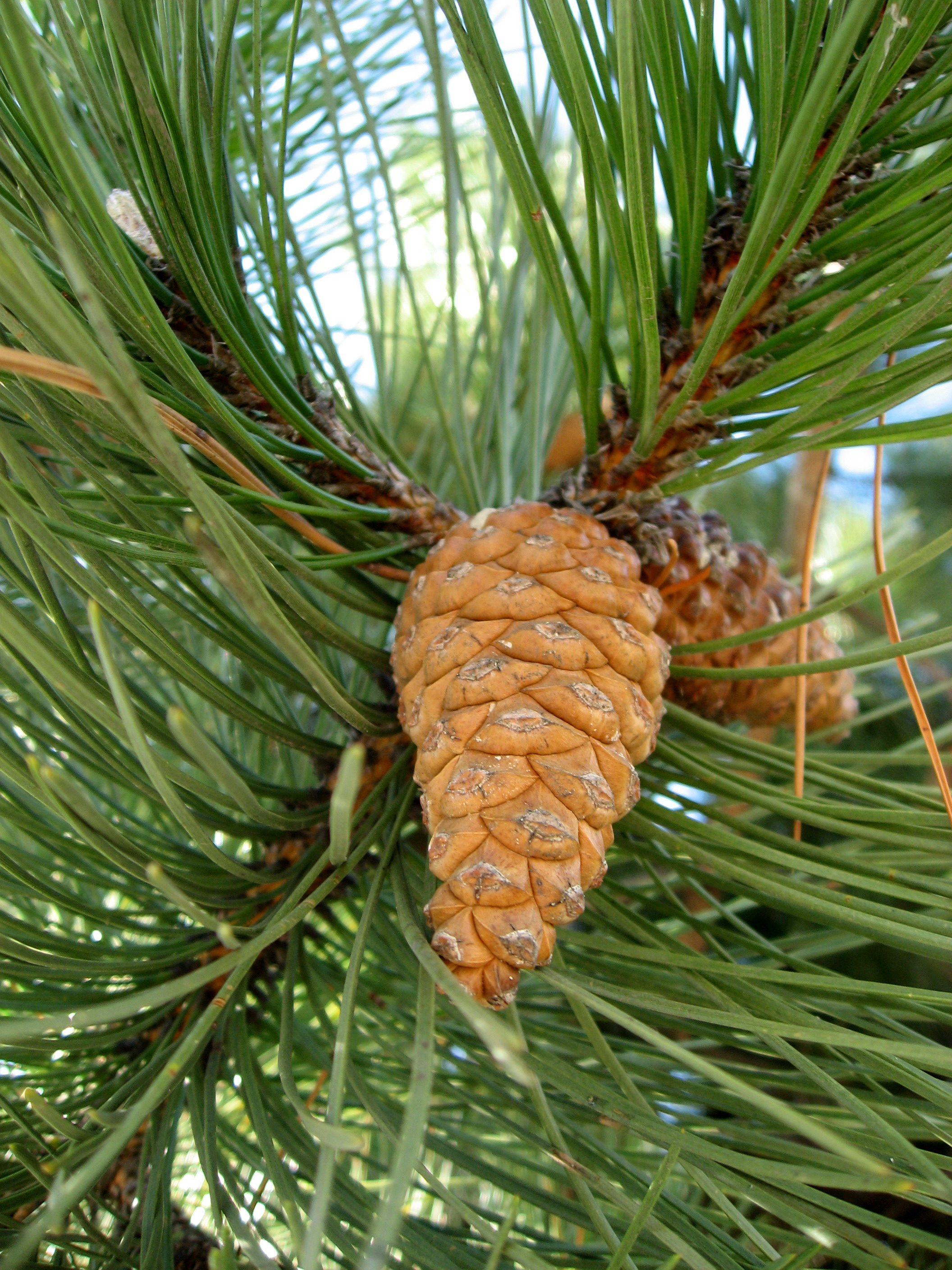 Borovicová šiška